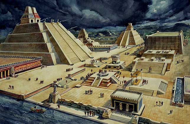 Representación de Diego Rivera de la posible apariencia de la ciudad de tenochtitlan anterior a la llegada de los españoles.